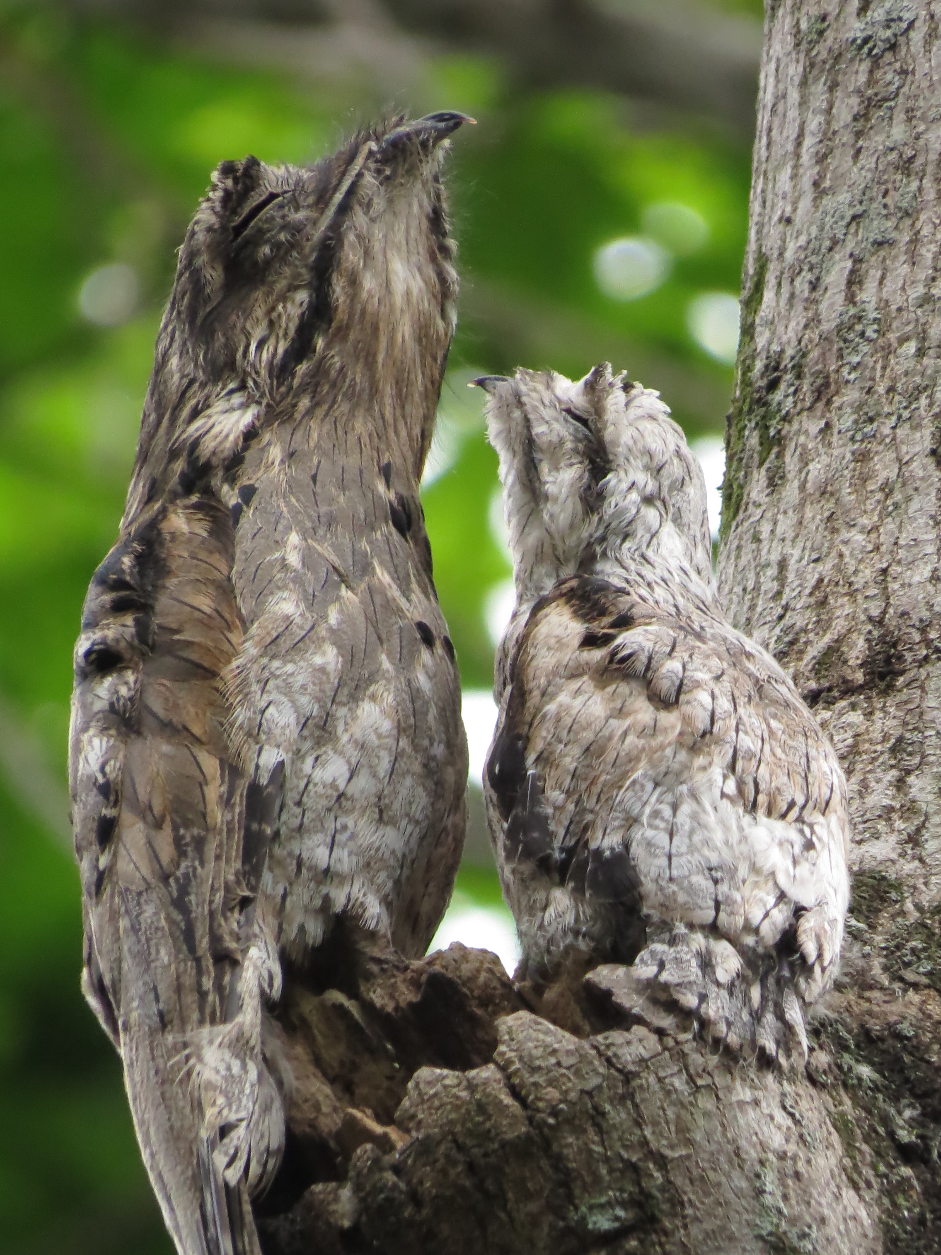 Raro encontro com esta ave fantástica (Nyctibius griseus) e pra melhorar com seu pequeno filhote.